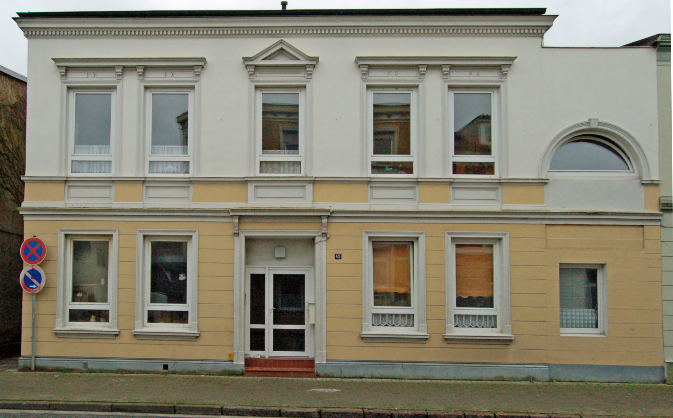 Haus in der Elmshorner Innenstadt